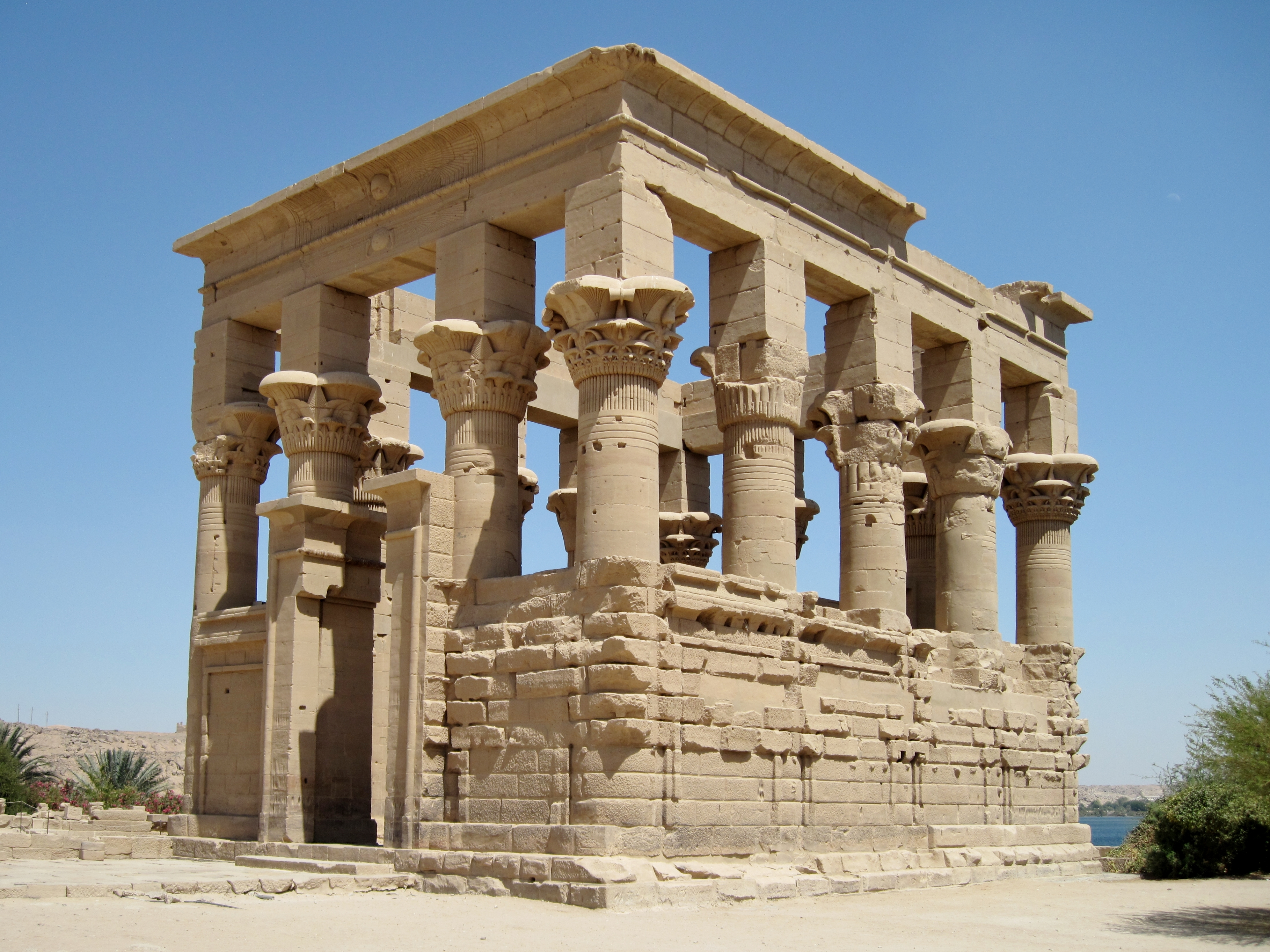 Kiosk des Trajan vor dem Isis-Tempel von Philae auf der Insel Agilkia, Ägypten